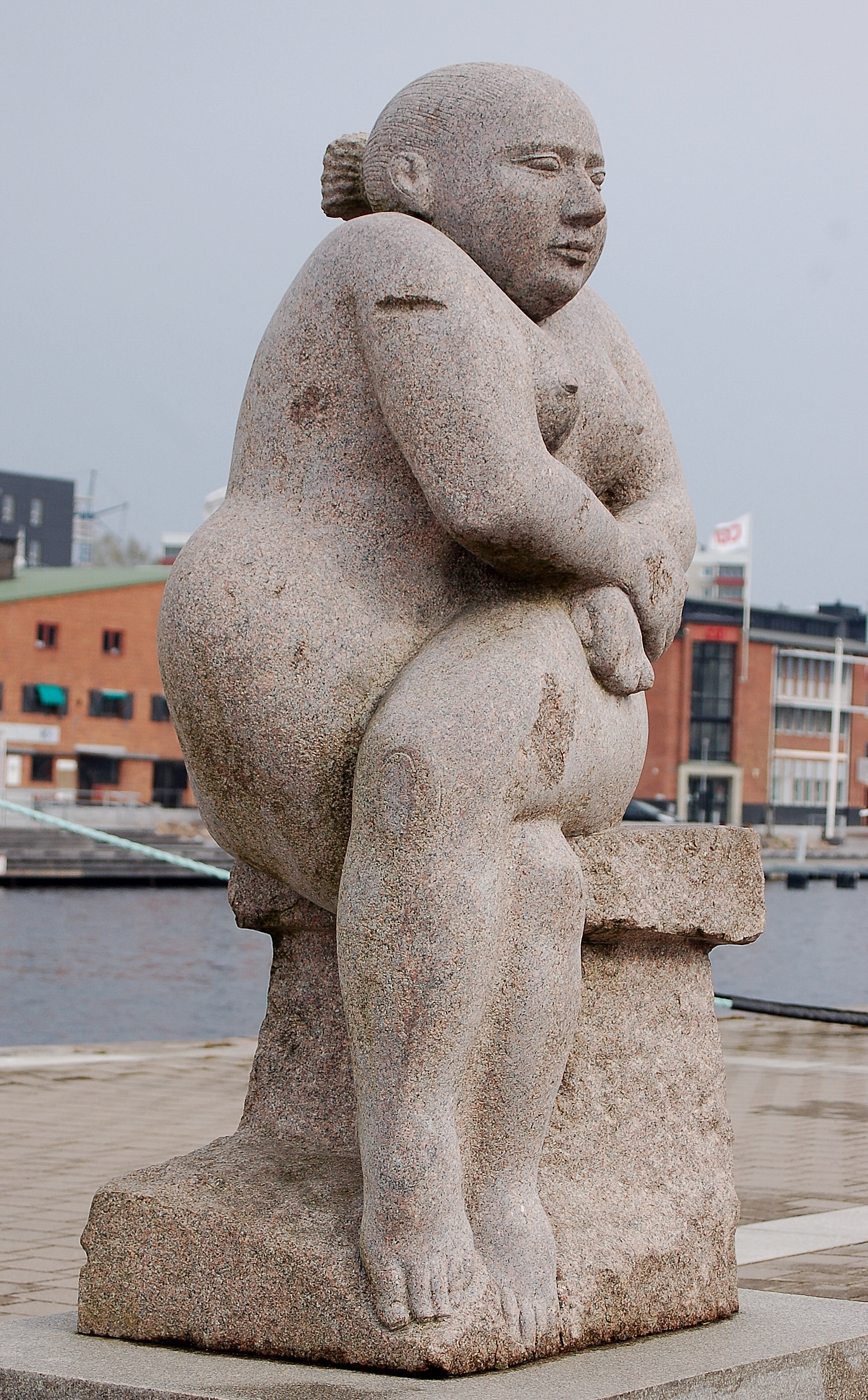 Med ett leende av Viktor Korneev 2007 utförd i bohusgranit Placerad i Viken inre hamn, Karlstad.